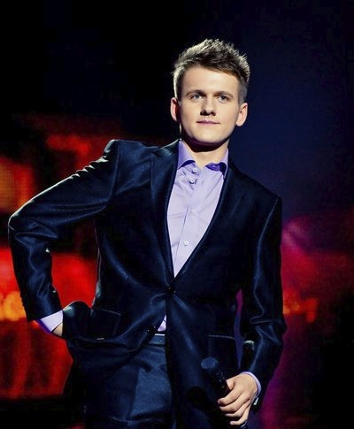 TV3 Eesti otsib superstaari. Autor: Jelena Rudi. Kõik õigused kaitstud ja foto kasutamise suhtes on luba küsitud.